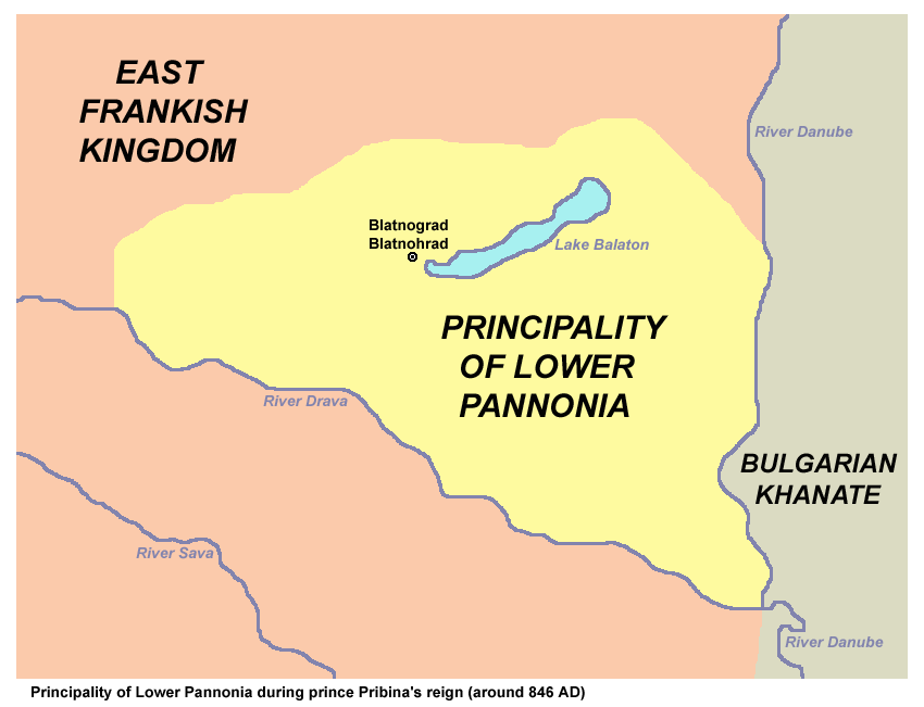 Principality of Lower Pannonia, one of the earliest Slavic states, during Prince Pribina's reign (around 846 AD). Kneževina Donja Panonija, jedna od prvih slovenskih država, tokom vladavine kneza Pribine (oko 846. godine). Księstwo Błatneńskie - jedno z pierwszych państw słowiańskich.